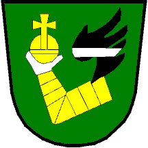 znak obce Petrůvka